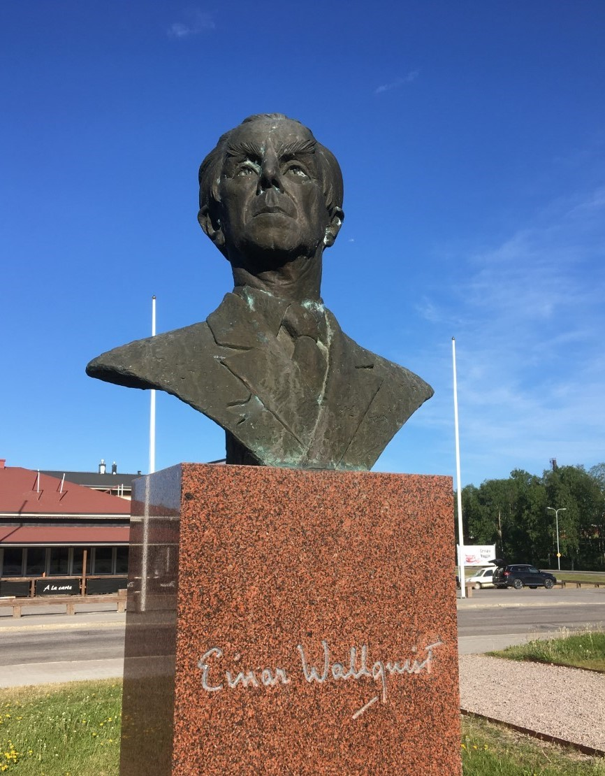 Byst Einar Wallquist utanför Silvermuseet i Arjeplog